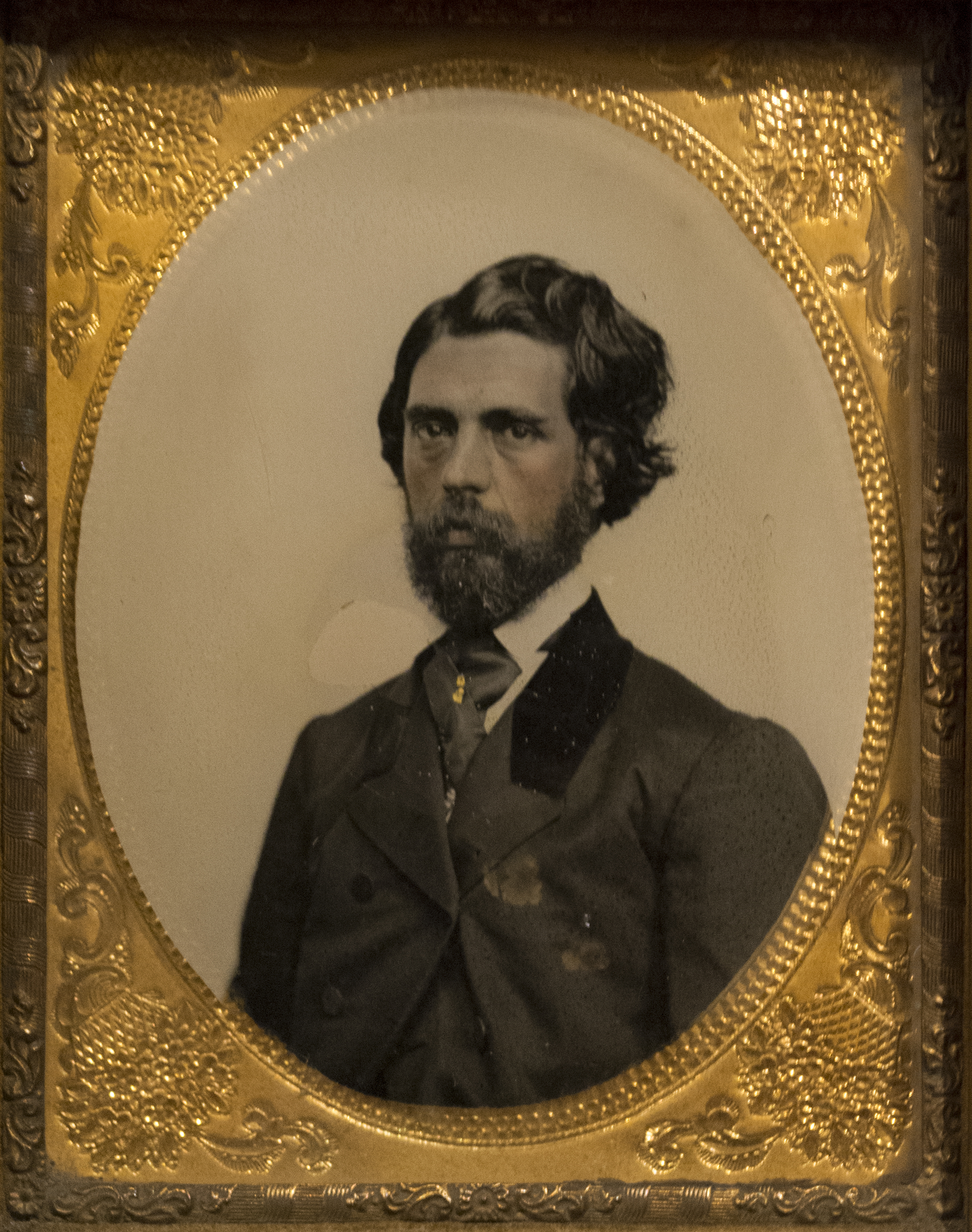 Archivo provisto por el Museo Histórico Nacional de Uruguay en el marco de un proyecto GLAM entre esa institución y Wikimedia Uruguay.